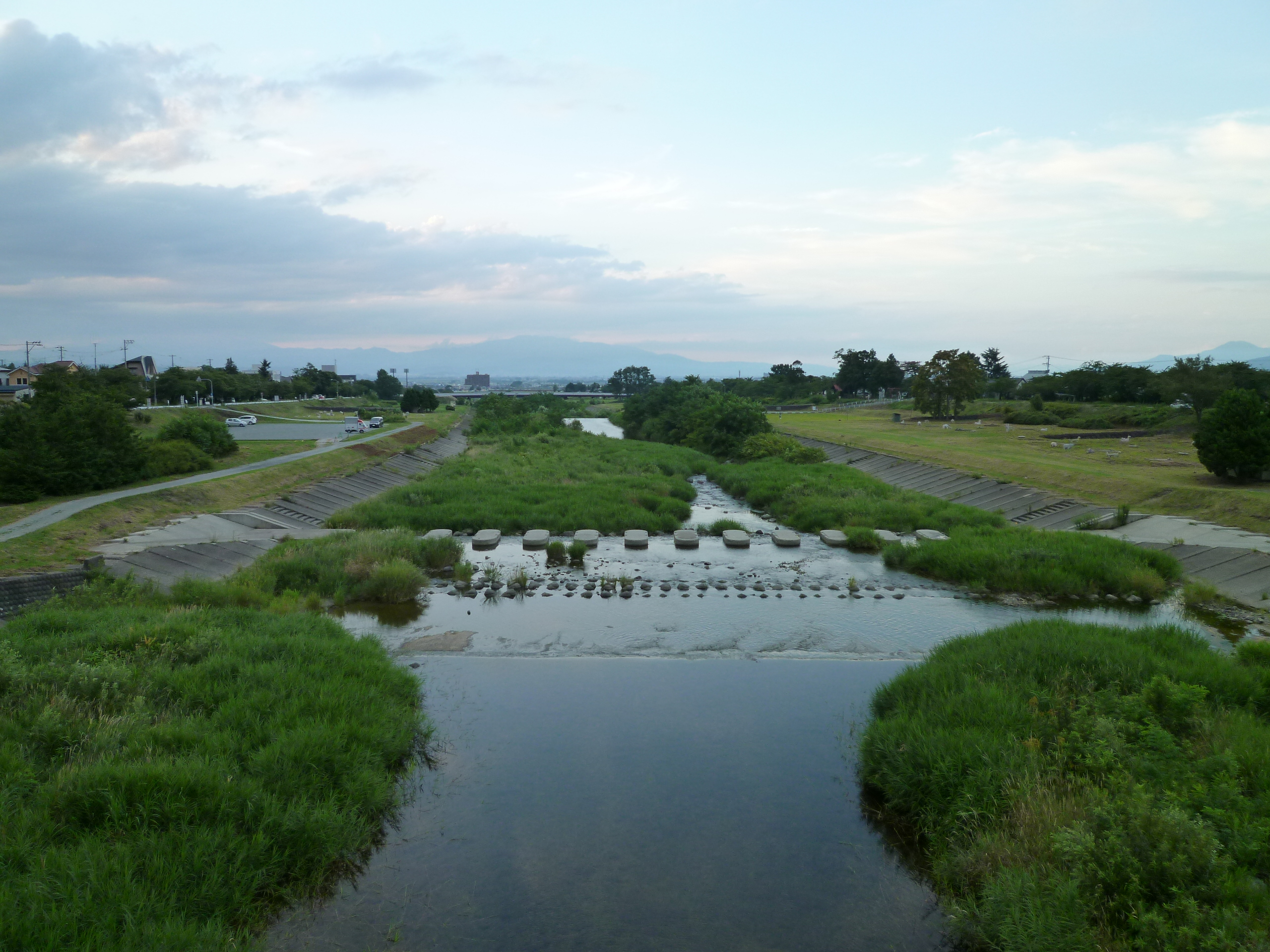 馬見ヶ崎川（双月橋より下流方向）